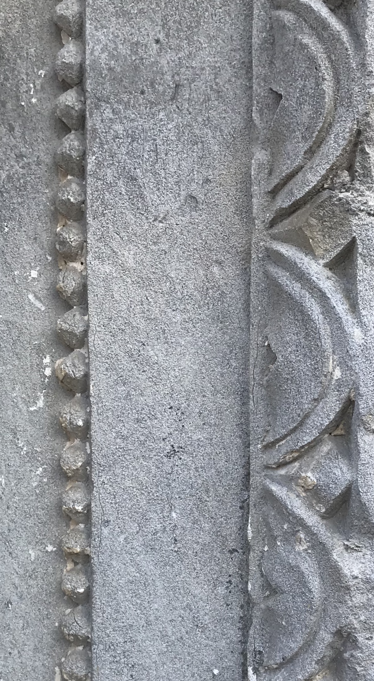 Chiesa di Santa Maria del Soccorso a Caccuri